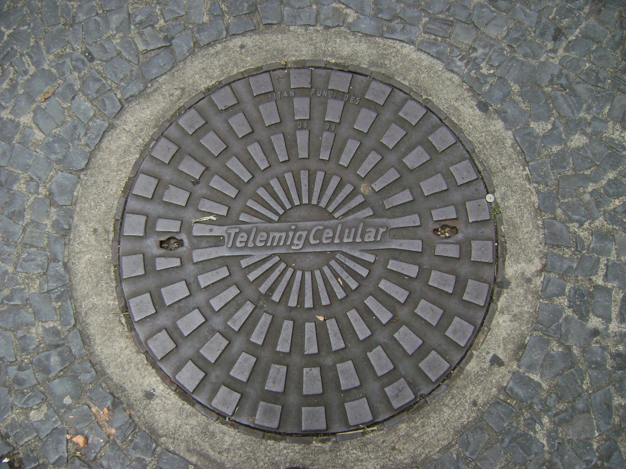 Poço de visita (bueiro) da Telemig Celular em Belo Horizonte.